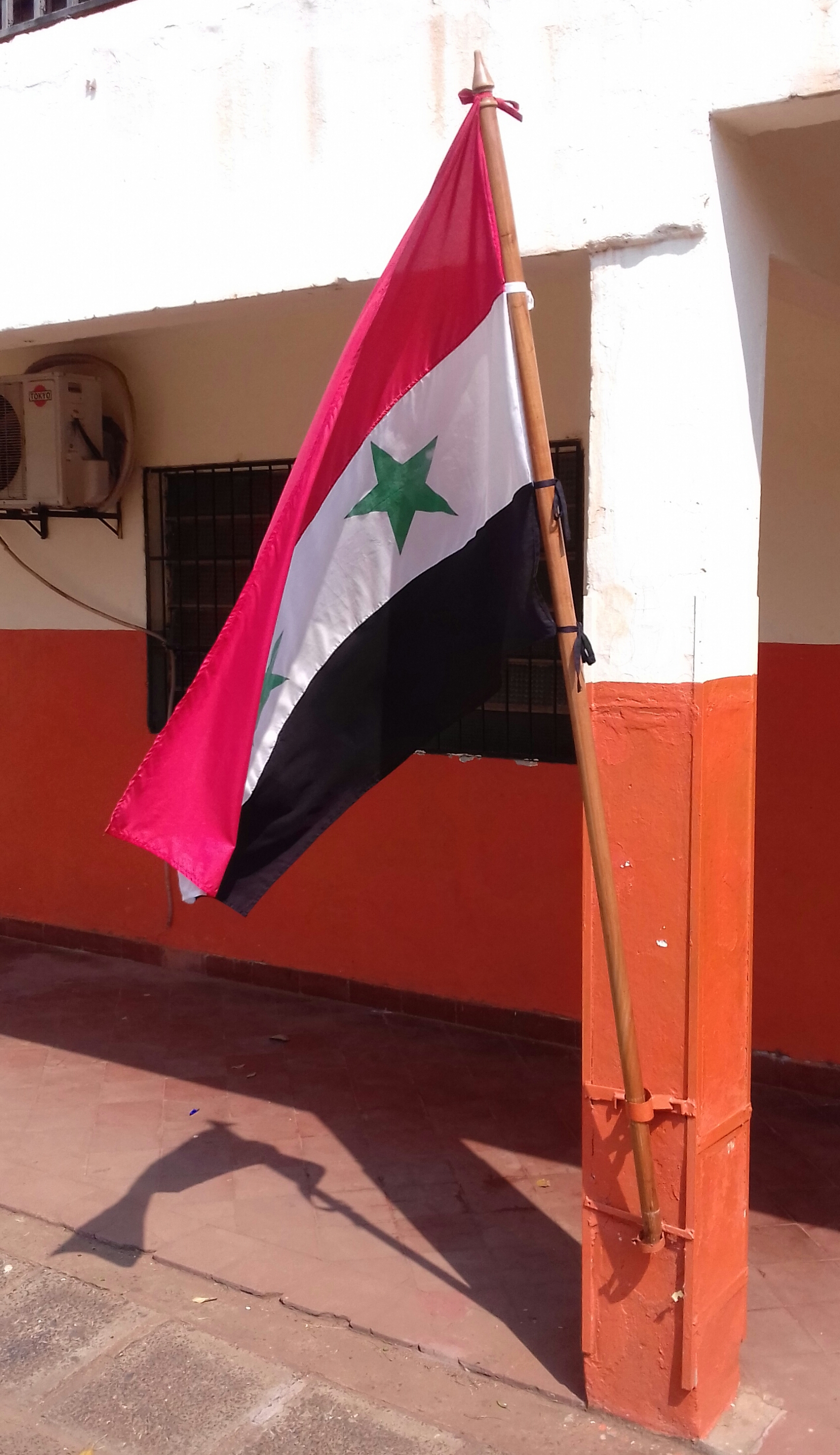 Detalle de una bandera de la República Árabe Unida de Siria en la escuela homónima en San Lorenzo, Paraguay.